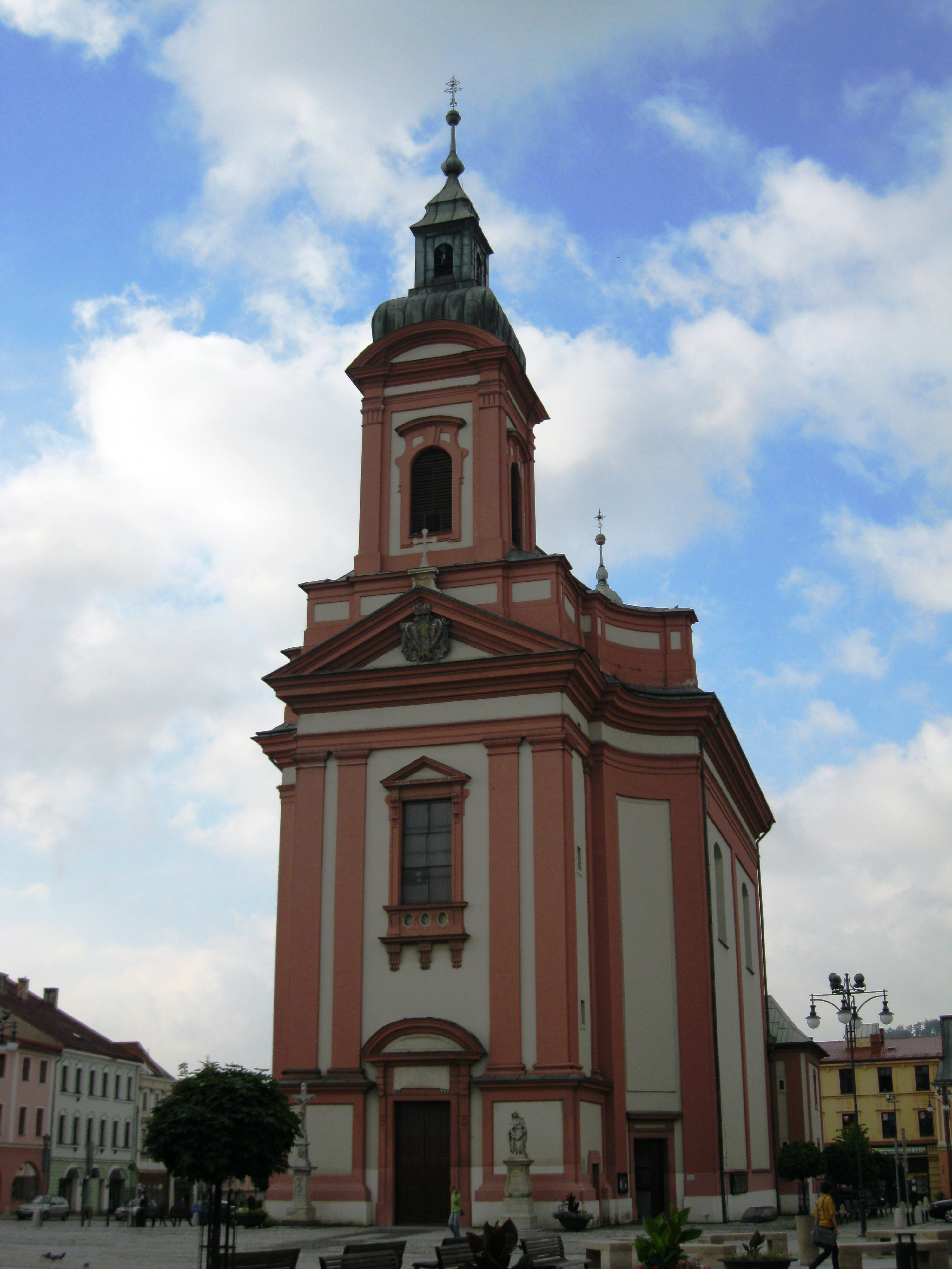 Kostel Stětí sv. Jana Křtitele (Hranice)